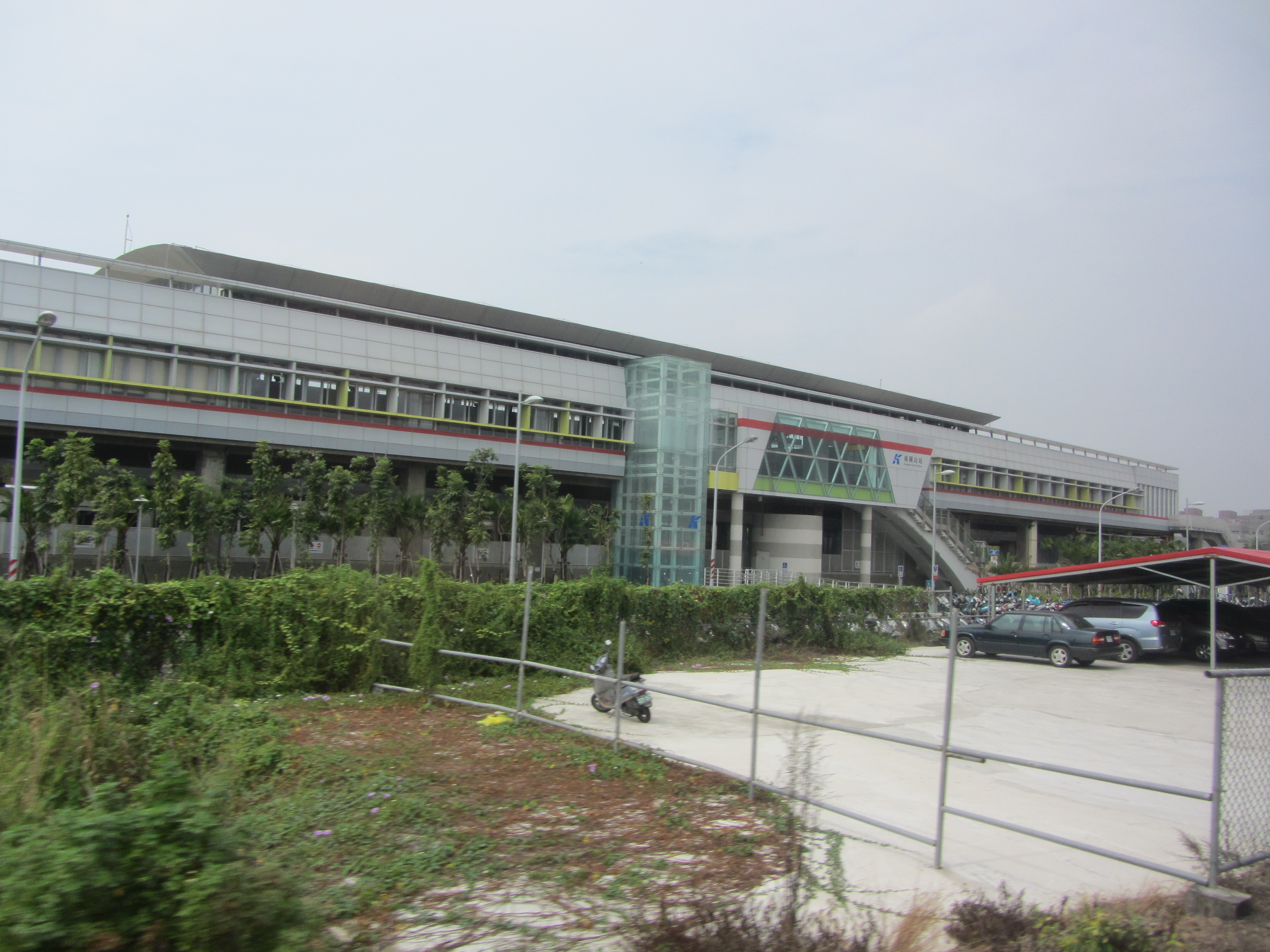 高雄捷運南岡山站站體。